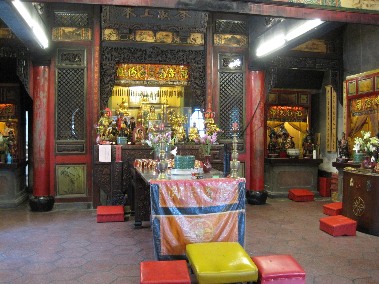 臺南重慶寺內部